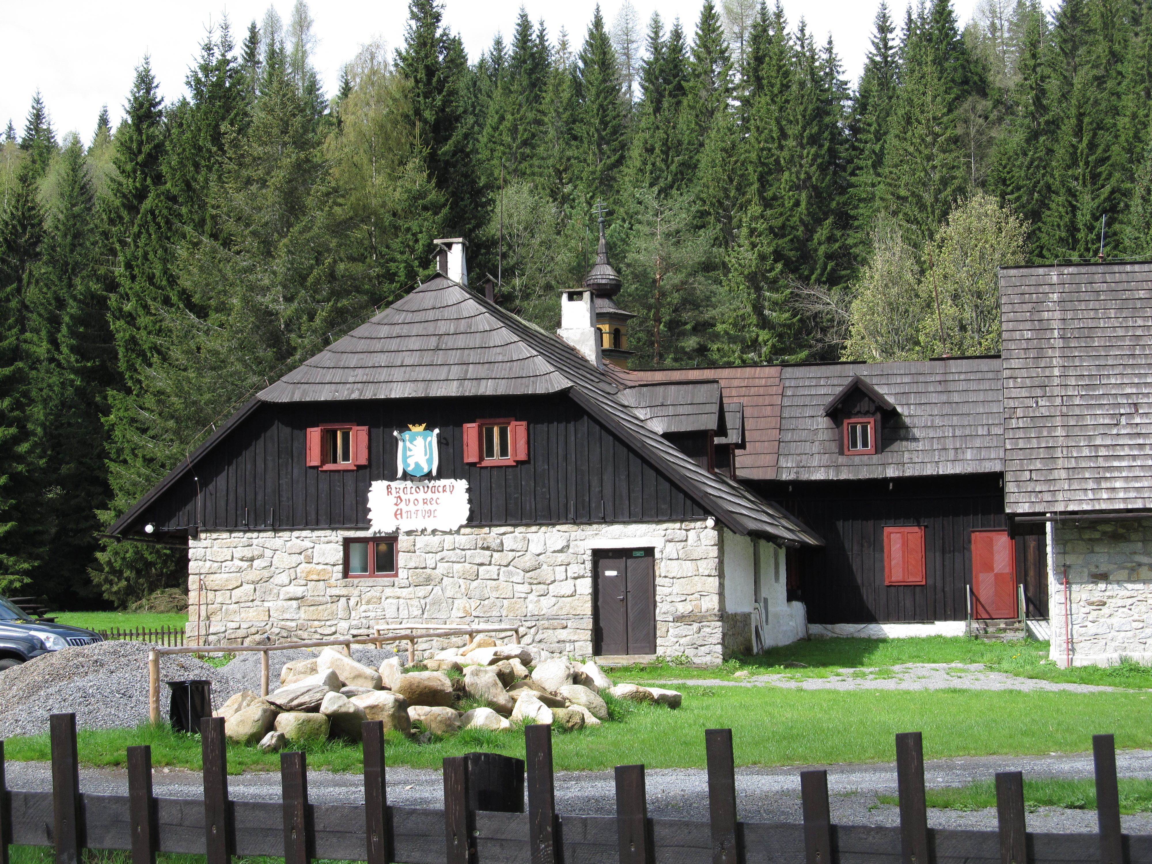 Dvorec Antigl (Rokyta), Rokyta 97